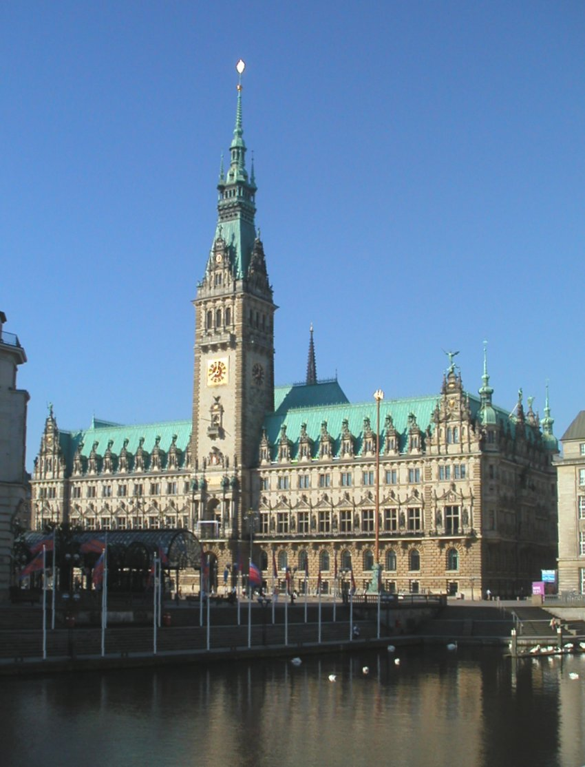 Das Hamburger Rathaus in der Altstadt von den Alsterarkaden aus gesehen.